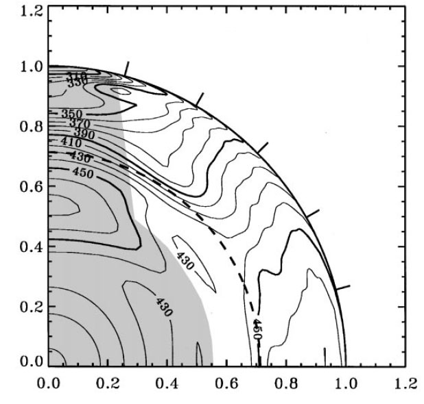 Rotációs frekv.